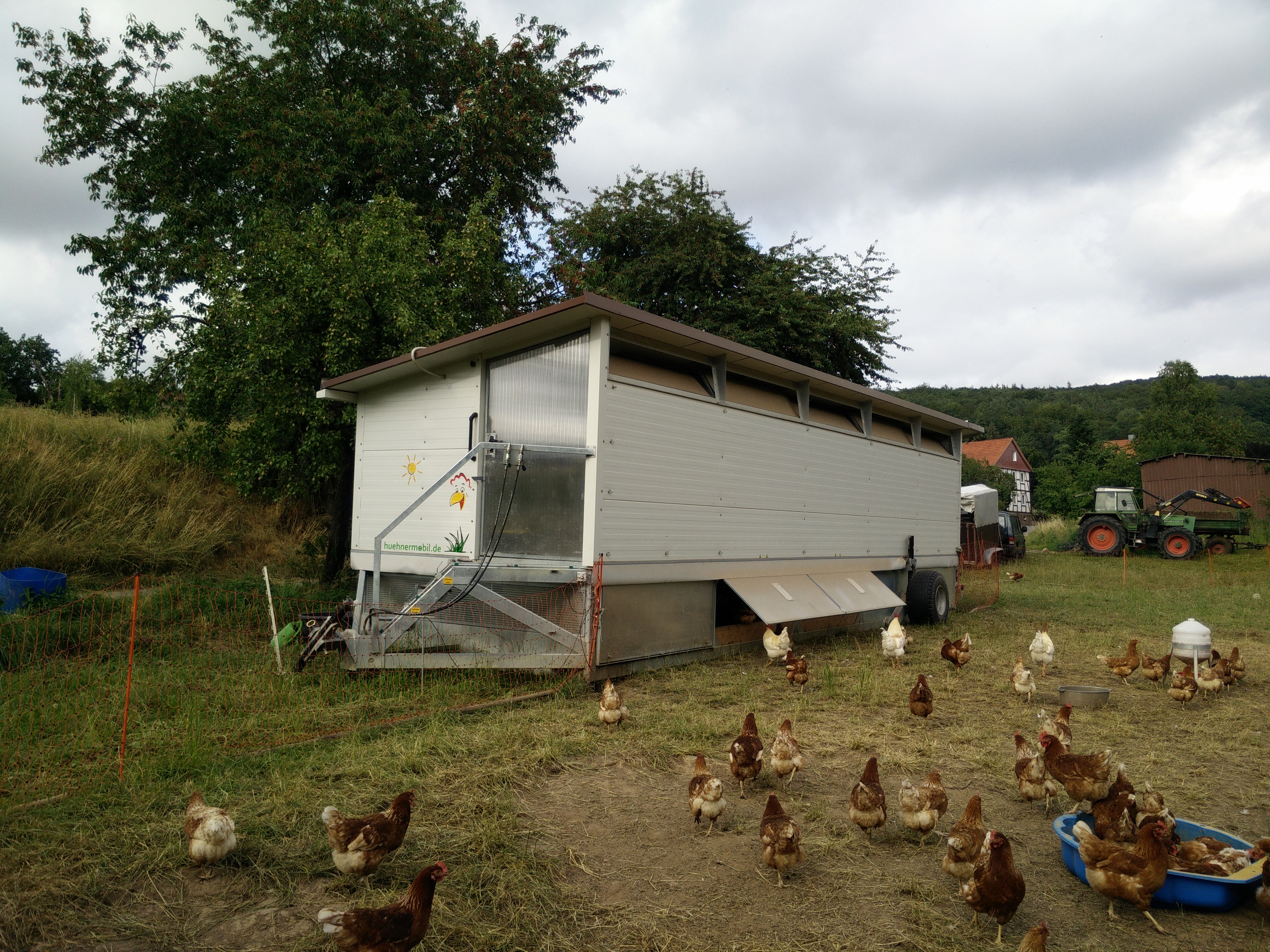 Bei diesem Stallsystem handelt es sich um ein Kombi Modell. Es können Hennen und Masthähnchen untergebracht werden.